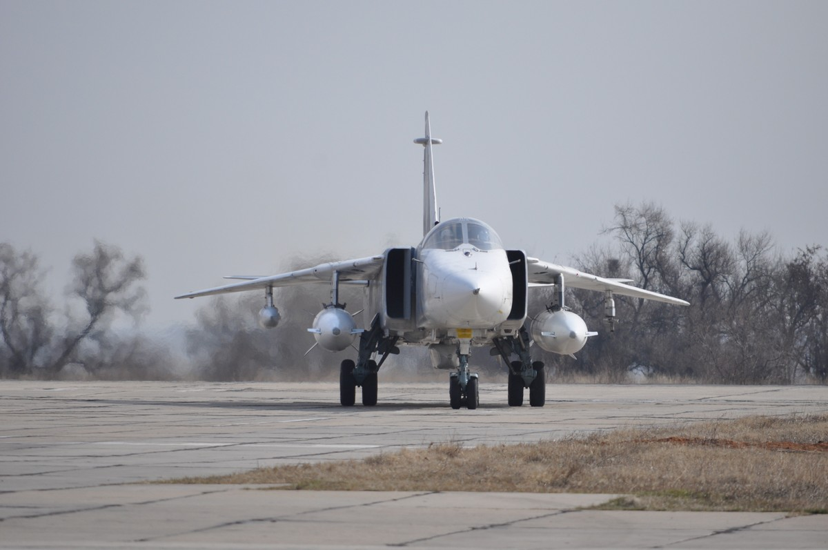 Учебные полёты экипажей многоцелевых истребителей фронтовых бомбардировщиков Су-24М ЧФ в канун дня образования морской авиации Черноморского флота (Республика Крым).